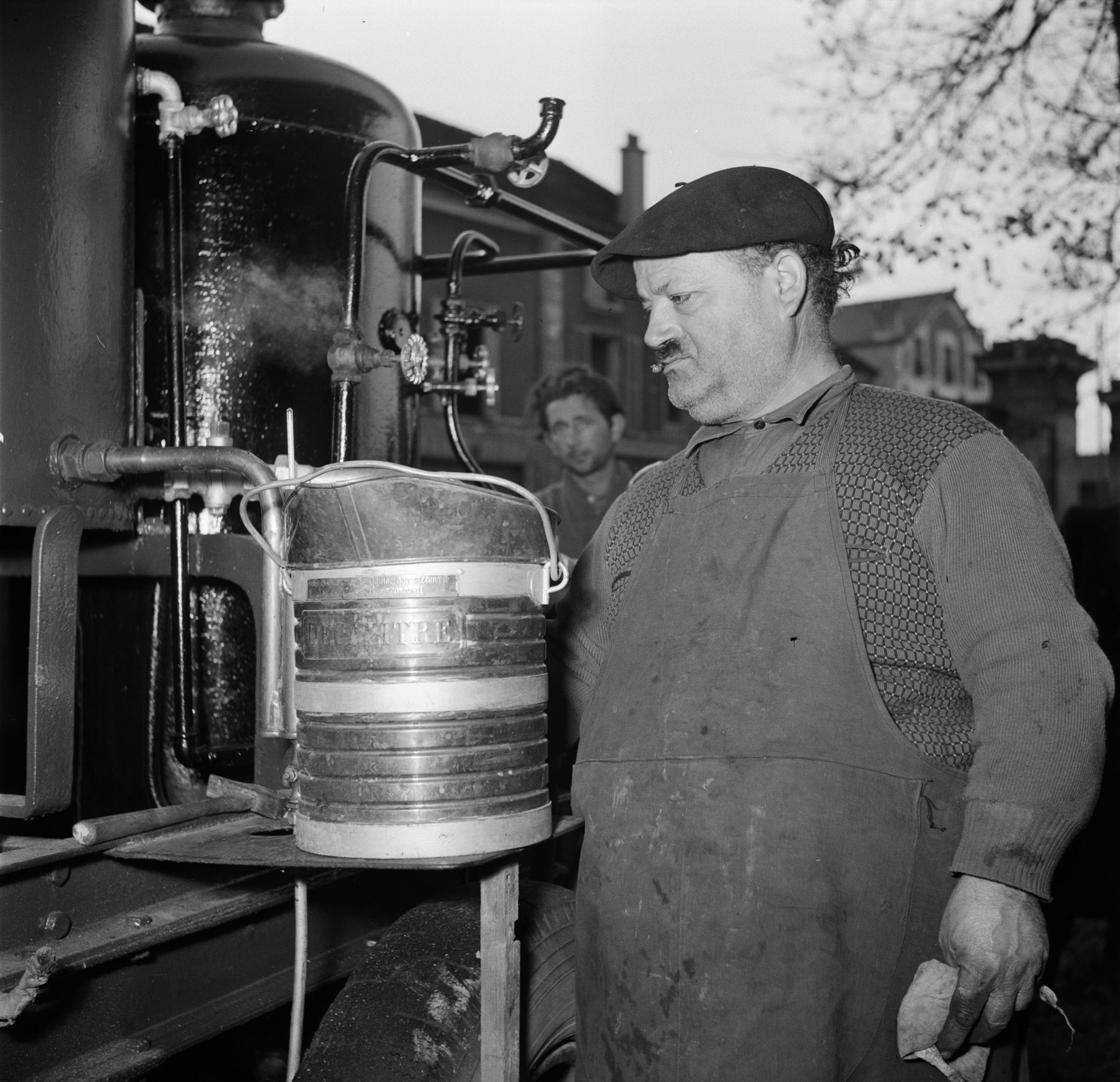 Collectie / Archief : Fotocollectie Van de Poll Reportage / Serie : Destilleerketel in de open lucht Beschrijving : Man tapt uit het vat Datum : 1954 Locatie : Frankrijk, Parijs Trefwoorden : alcohol, distilleerderijen, hoofddeksels, mannen, roken Fotograaf : Poll, Willem van de Auteursrechthebbende : Nationaal Archief Materiaalsoort : Negatief (zwart/wit) Nummer archiefinventaris : bekijk toegang 2.24.14.02 Bestanddeelnummer : 252-9489